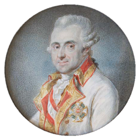 Portrait de Joseph de Ferraris (1784)